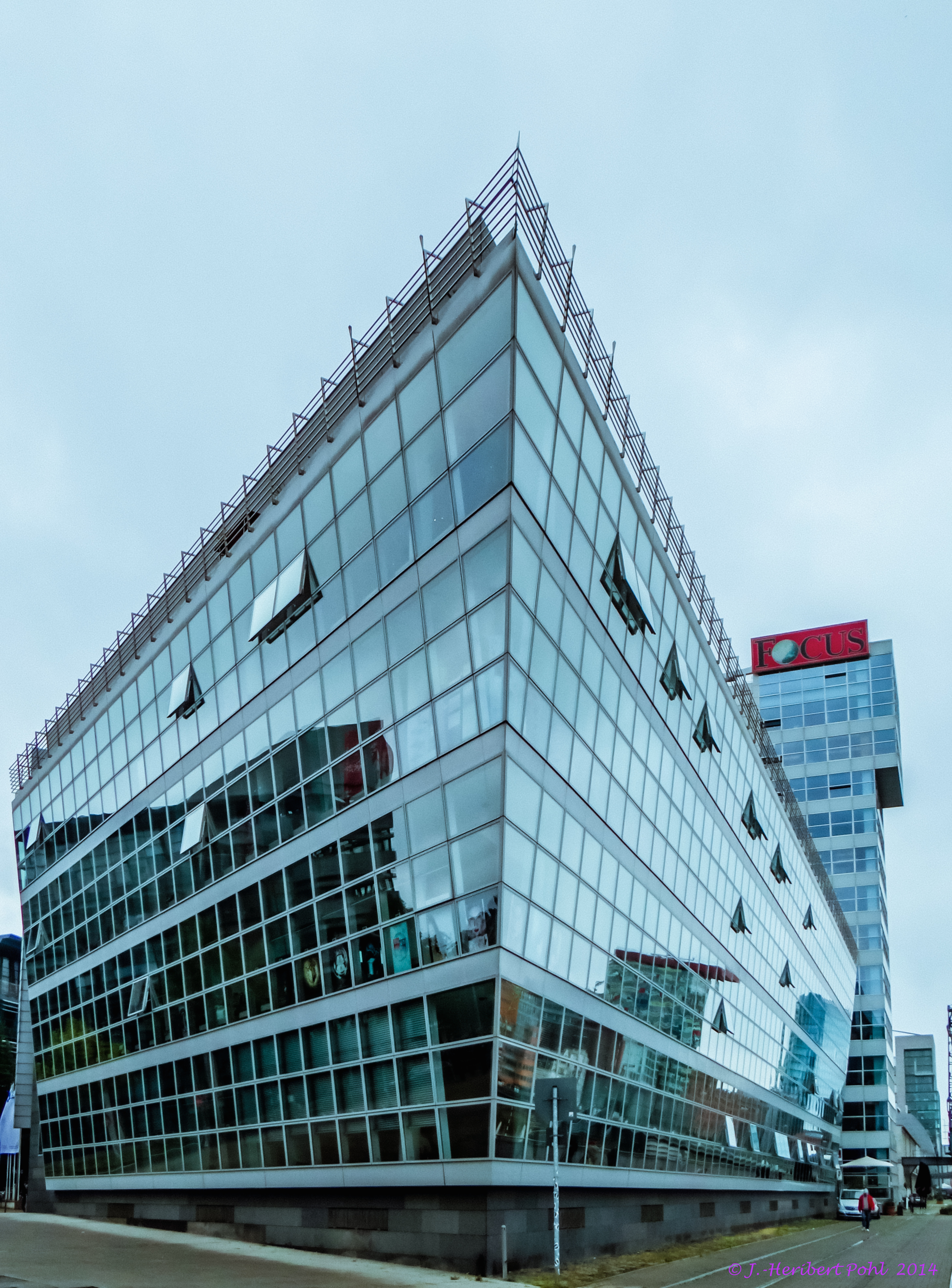 Düsseldorf, Medienhafen, Verlagsgebäude